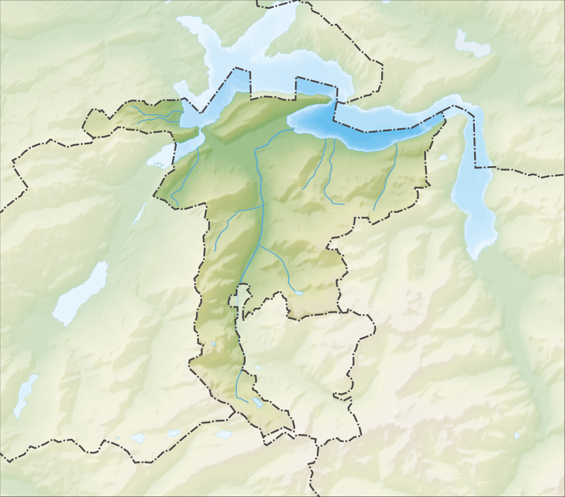 Reliefkarte des Kantons Nidwalden Topographischer Hintergrund: NASA Shuttle Radar Topography Mission (public domain). SRTM3 v.2.